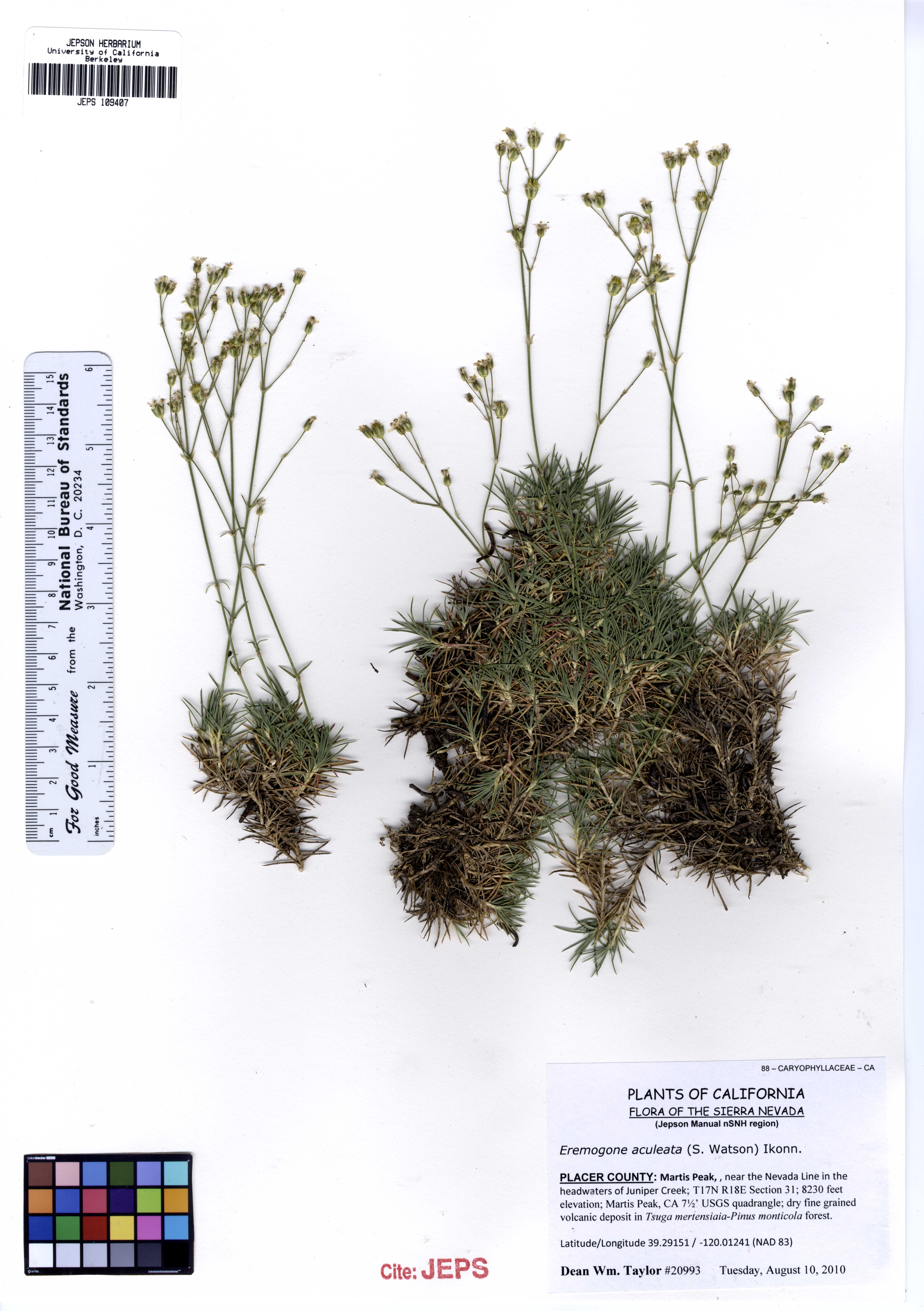 JEPS109407 Eremogene aculeata